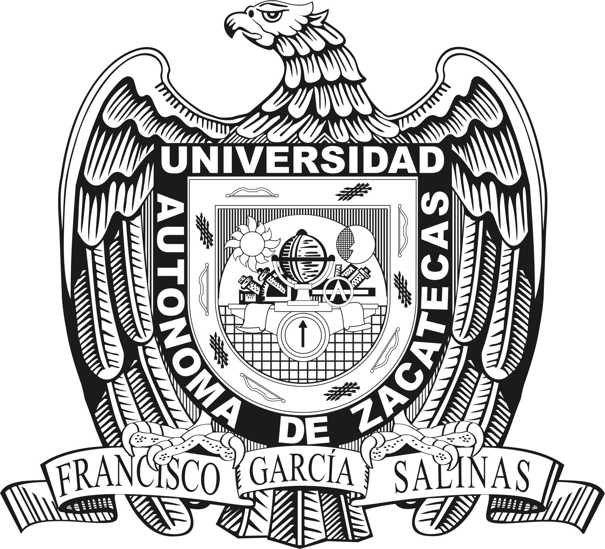 Escudo UAZ